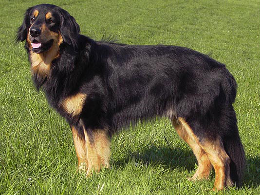 Hovawart-Rüde „Helos vom Holter Berg“ (RZV/FCI)